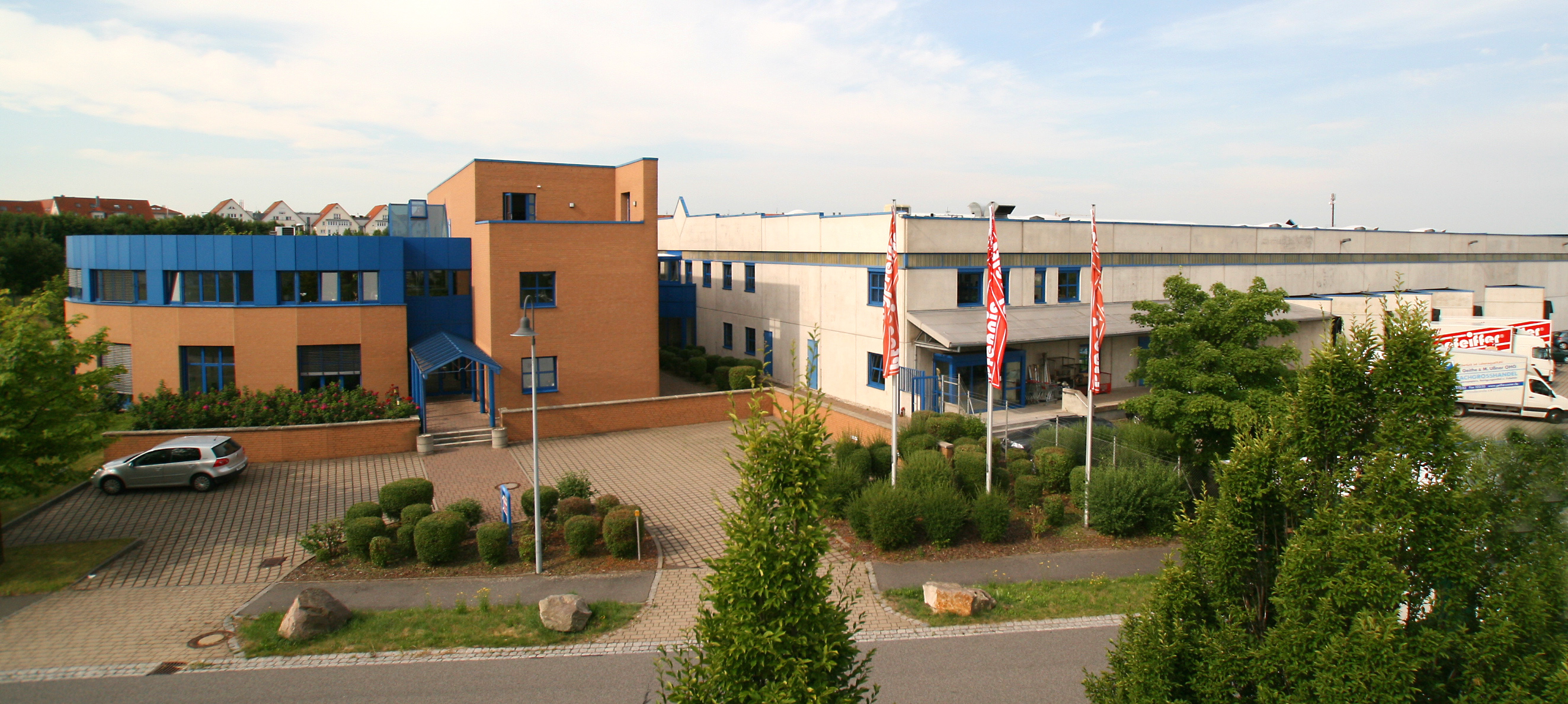 Ehemalige Pfennigpfeiffer-Zentrale in Kesselsdorf.